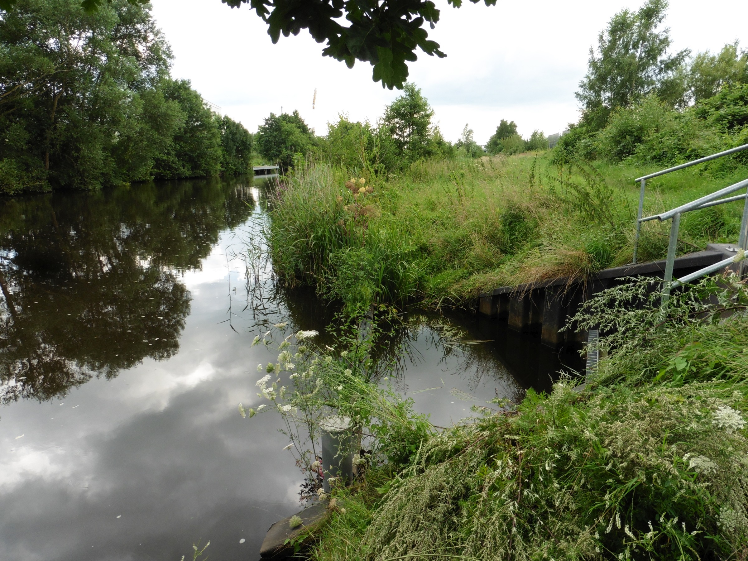 Ausmündung der Kampbille aus dem Schleusengraben